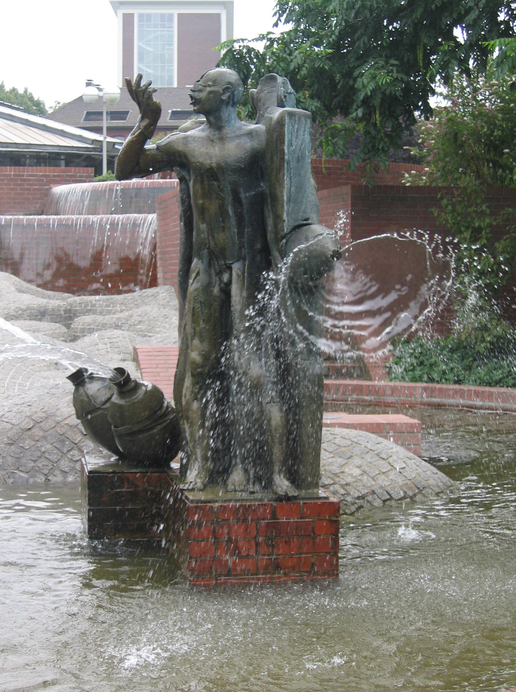 Gauklerbrunnen Stadtgarten Dortmund - Detailansicht own work August 2006